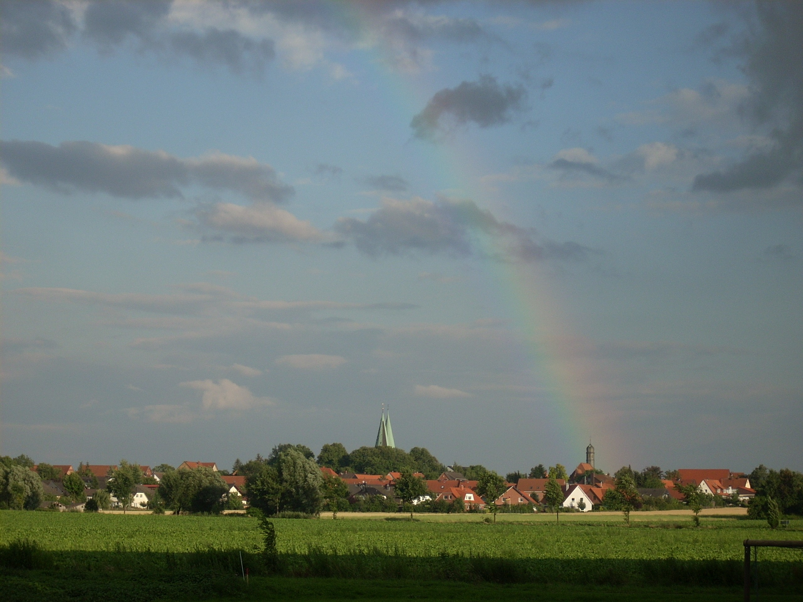 Regenbogen über Hohenhameln, Germany